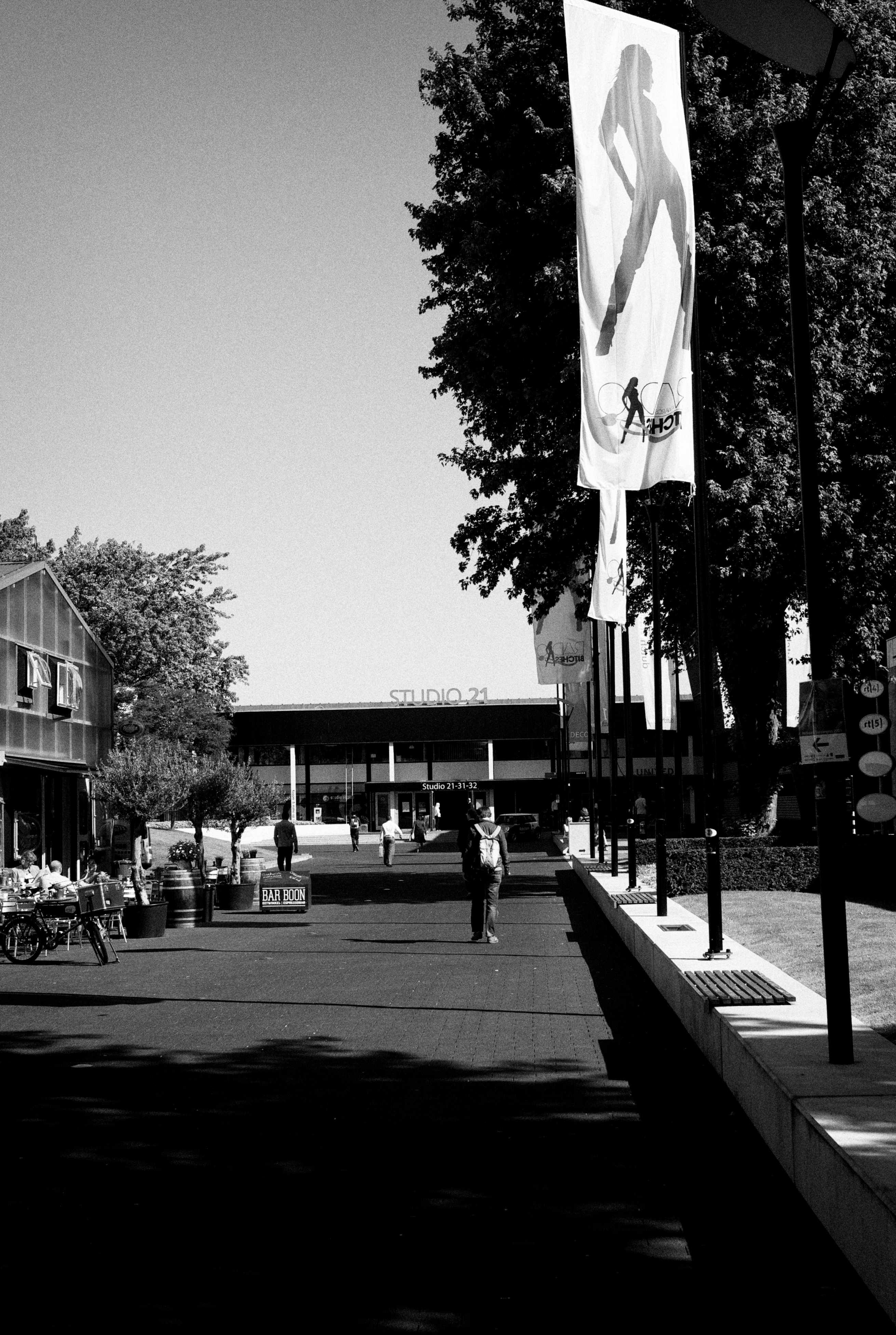 Het MPJC (Mediapark Jaarcongres) wordt op dinsdag 23 juni gehouden. Naast het plenaire congresprogramma zijn er ook andere activiteiten in en rondom studio 21, zoals het Spreek'buis pauzeprogramma, de grote jingles en tunes quiz met Kas van Iersel, Erik de Zwart en Gijs Staverman en na het MPJC de Radiobitches Awards.